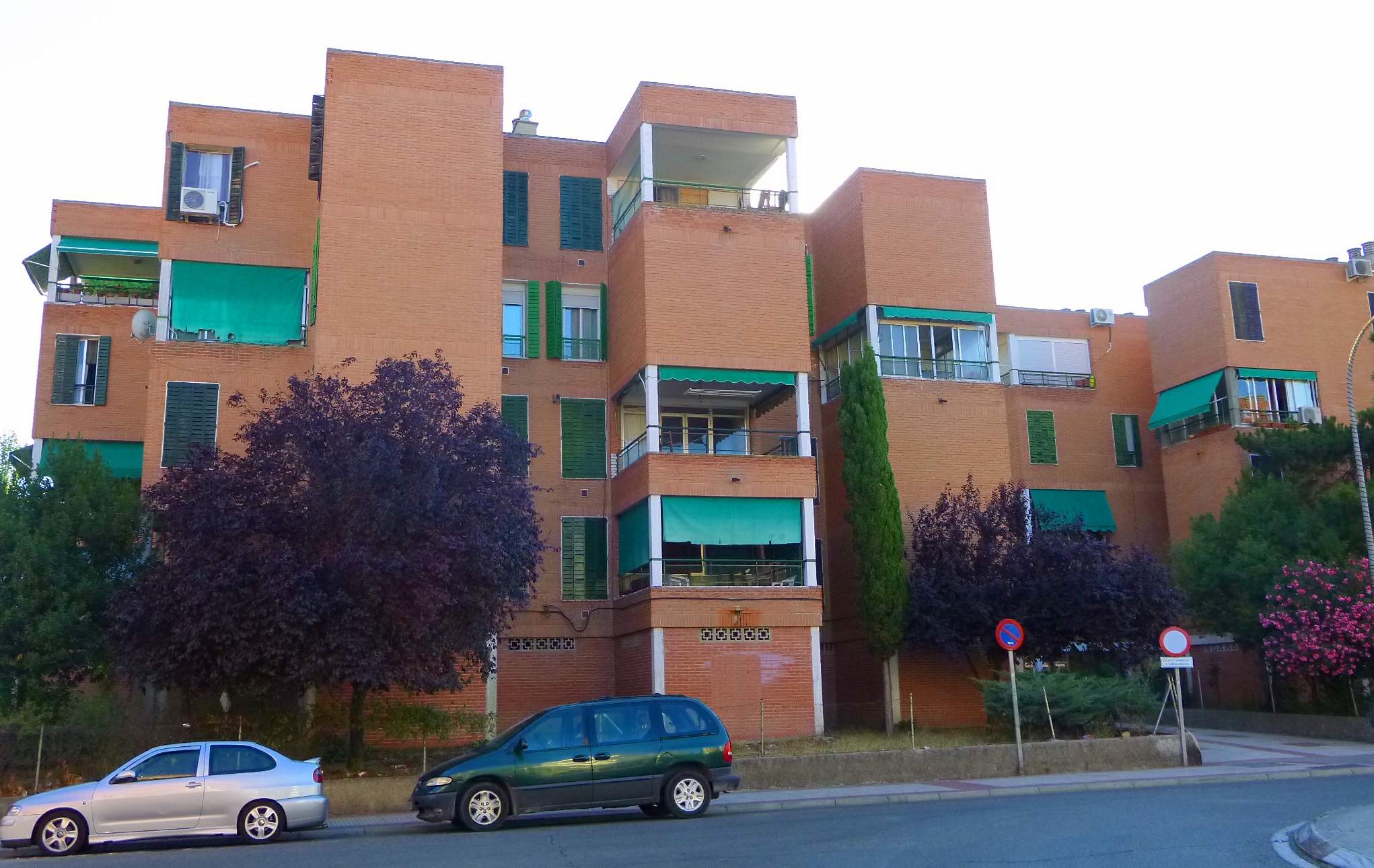 Viviendas experimentales del arquitecto Rafael Leoz, en el barrio de Las Fronteras de Torrejón de Ardoz (Madrid)